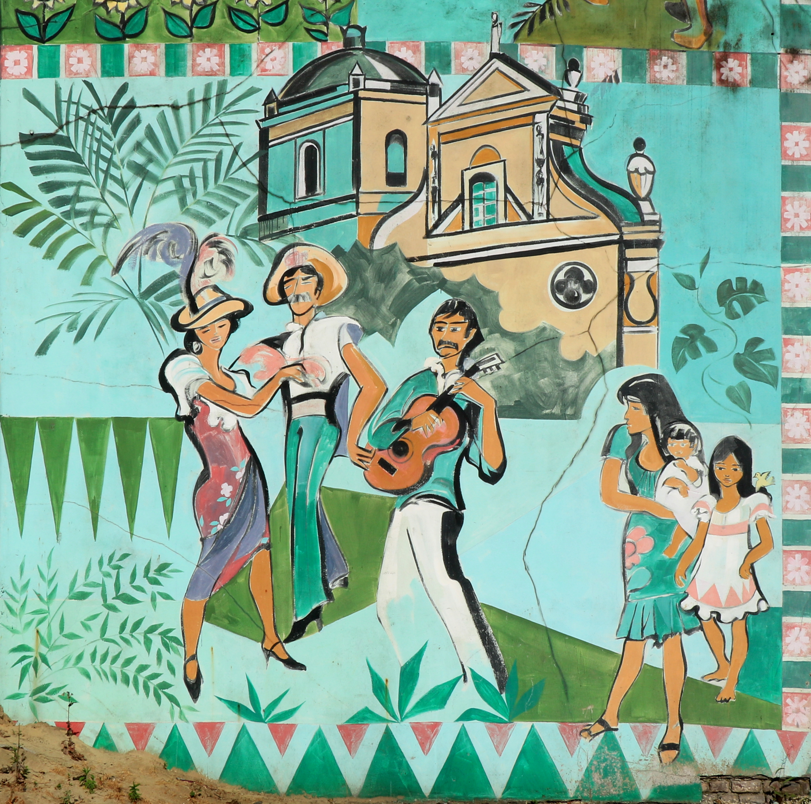 Belgique - Ottignies - Centre culturel - Fresque « La Liesse populaire » (Claude Rahir, 1993)